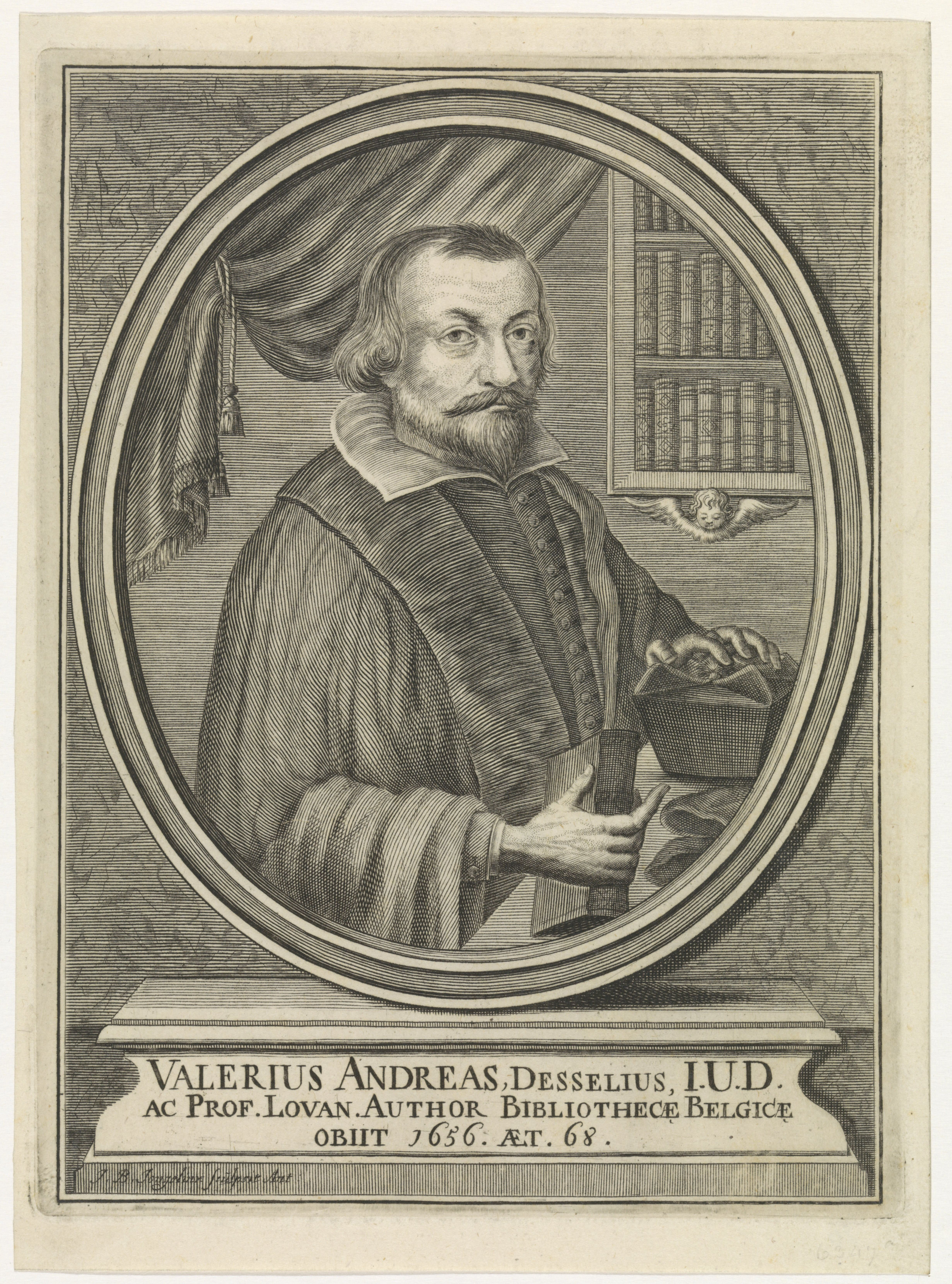 Portret van de schrijver Valerius Andreas, ten halven lijve. Hij staat voor een tafel, in zijn rechterhand houdt hij een boek en zijn linkerhand rust op een biretta. Op de achtergrond een kast met boeken. Het portret is gevat in een ovale omlijsting. Ets en gravure. Op de piëdestal een drieregelig onderschrift in het Latijn. Rijksmuseum RP-P-1903-A-22977